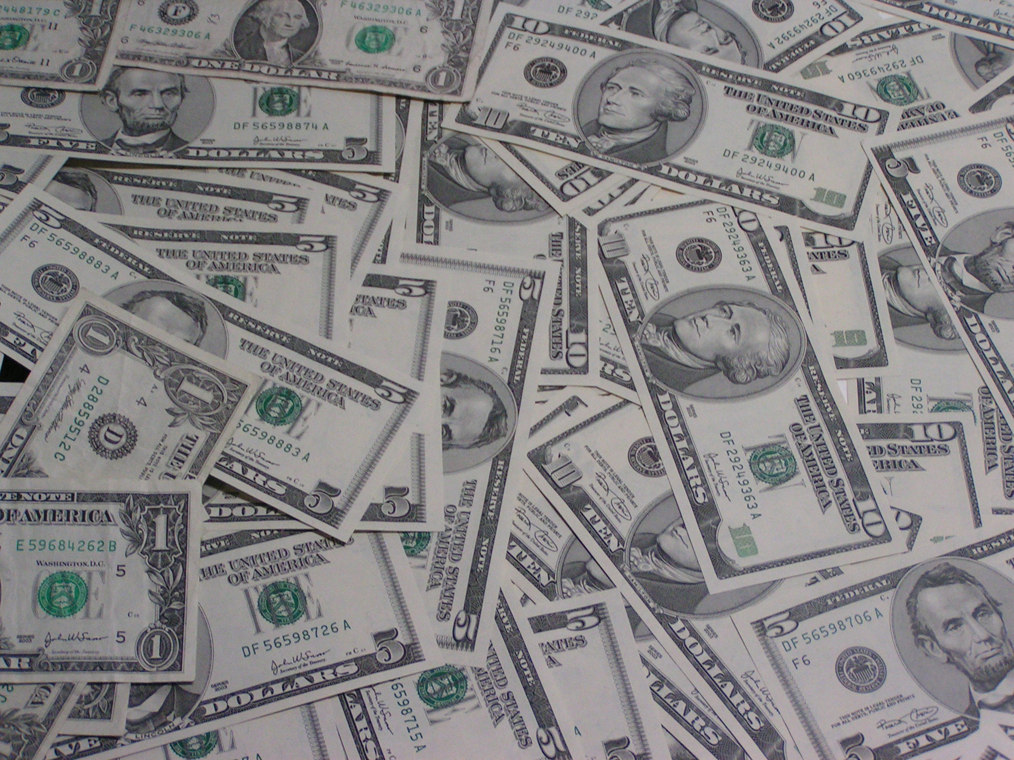 Mehrere 1, 5 und 10 Dollarnoten, selbstfotografiert von Manuel Dohmen